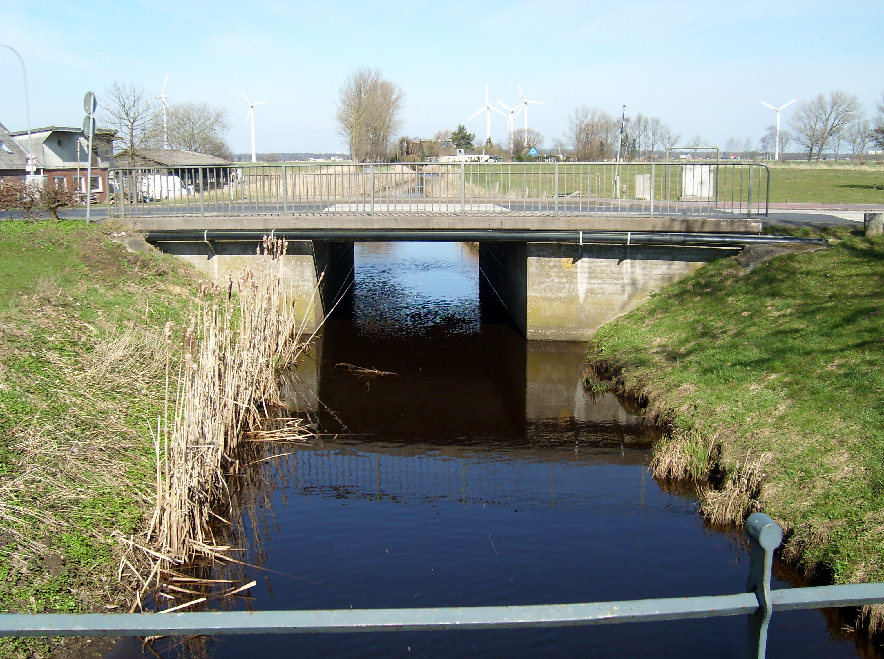 Krempau bei der Straßenbrücke (L 112) bei der Steinburg im gleichnamigen Ortsteil der Gemeinde Süderau; Blickrichtung entgegen Fließrichtung